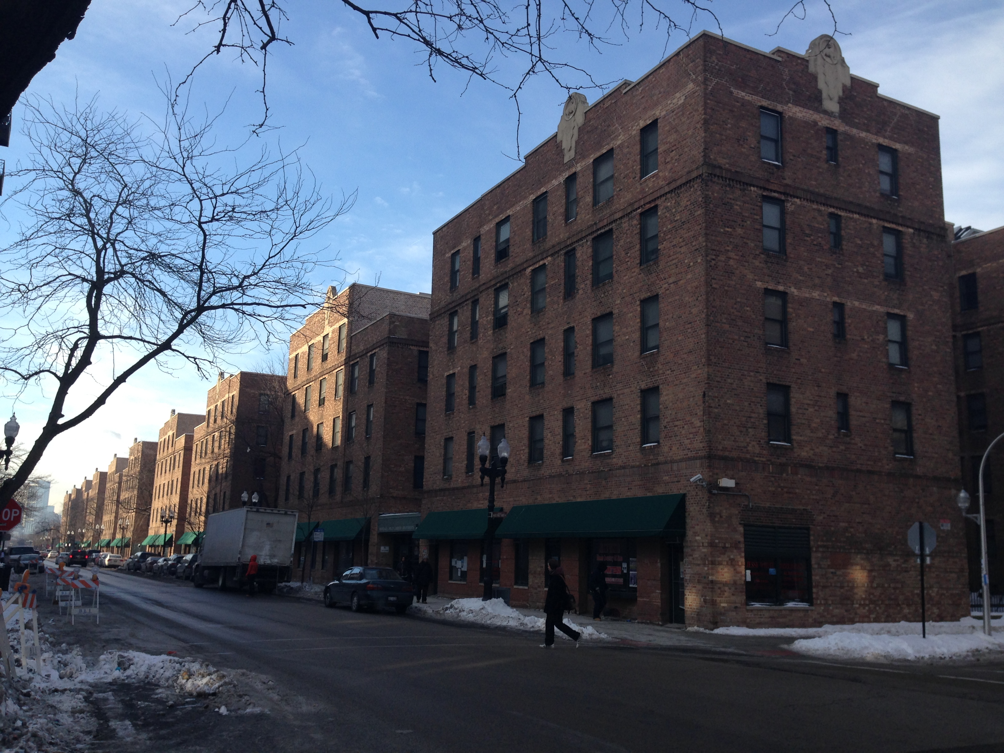 Marshall Field Garden Apartments